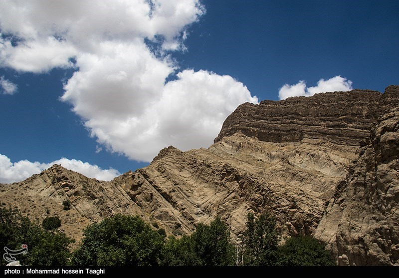 کوه های هزار مسجد